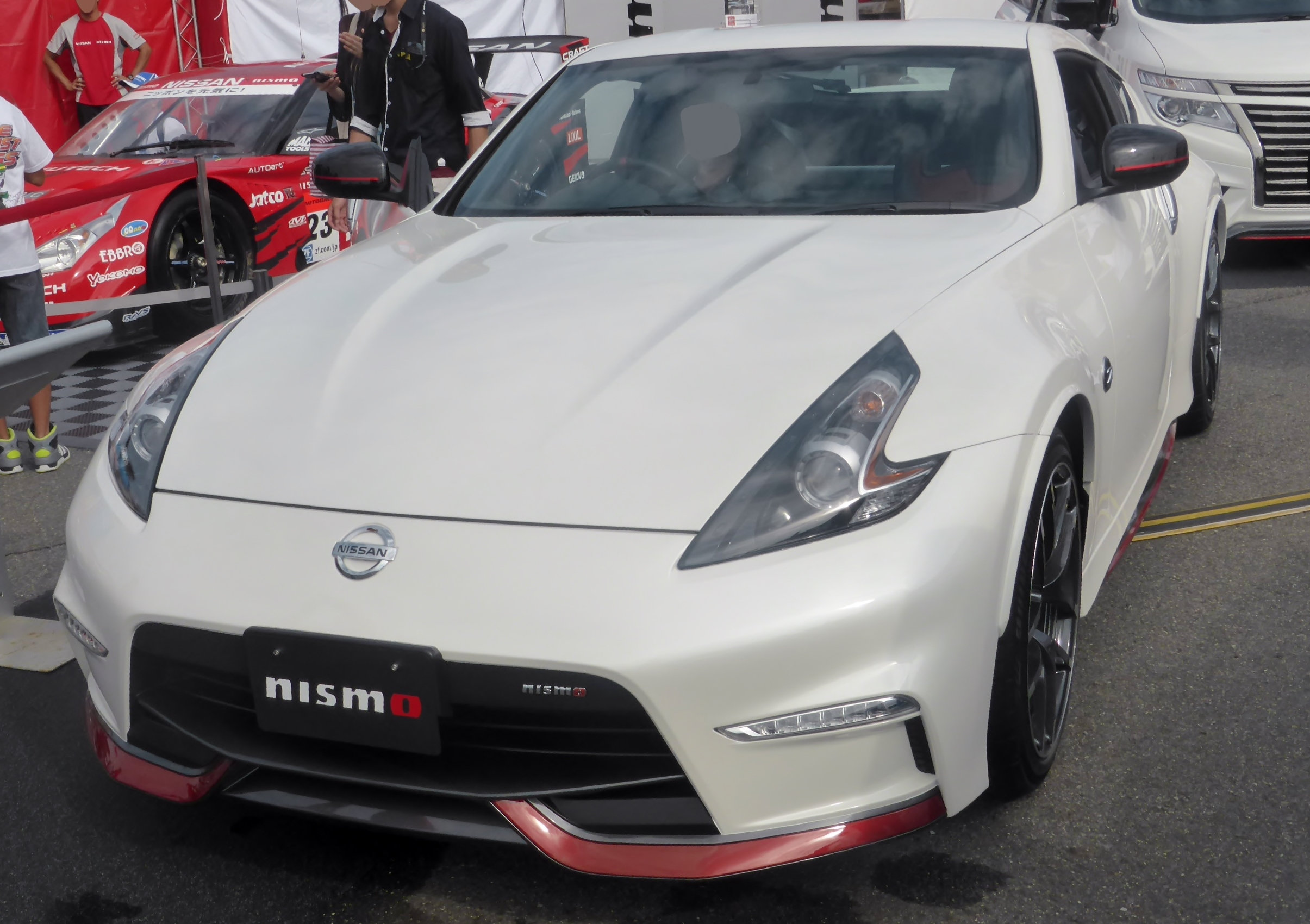 Z34型日産・フェアレディZニスモをフロントから撮影。